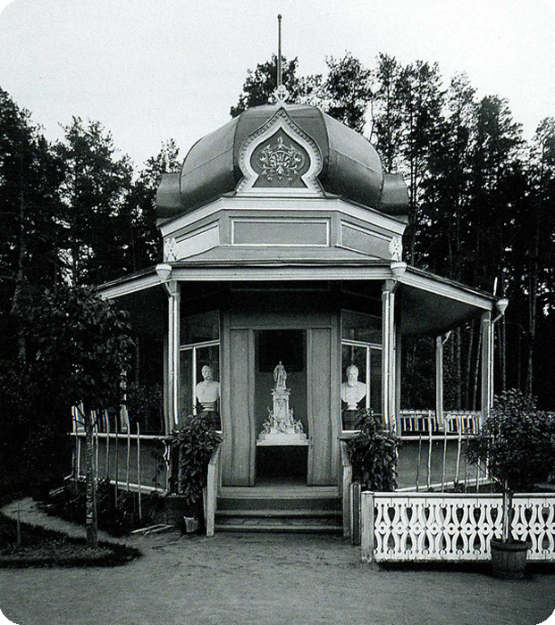 Александровское убежище в Москве. Царский павильон.